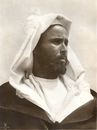 Caïd Tunisie